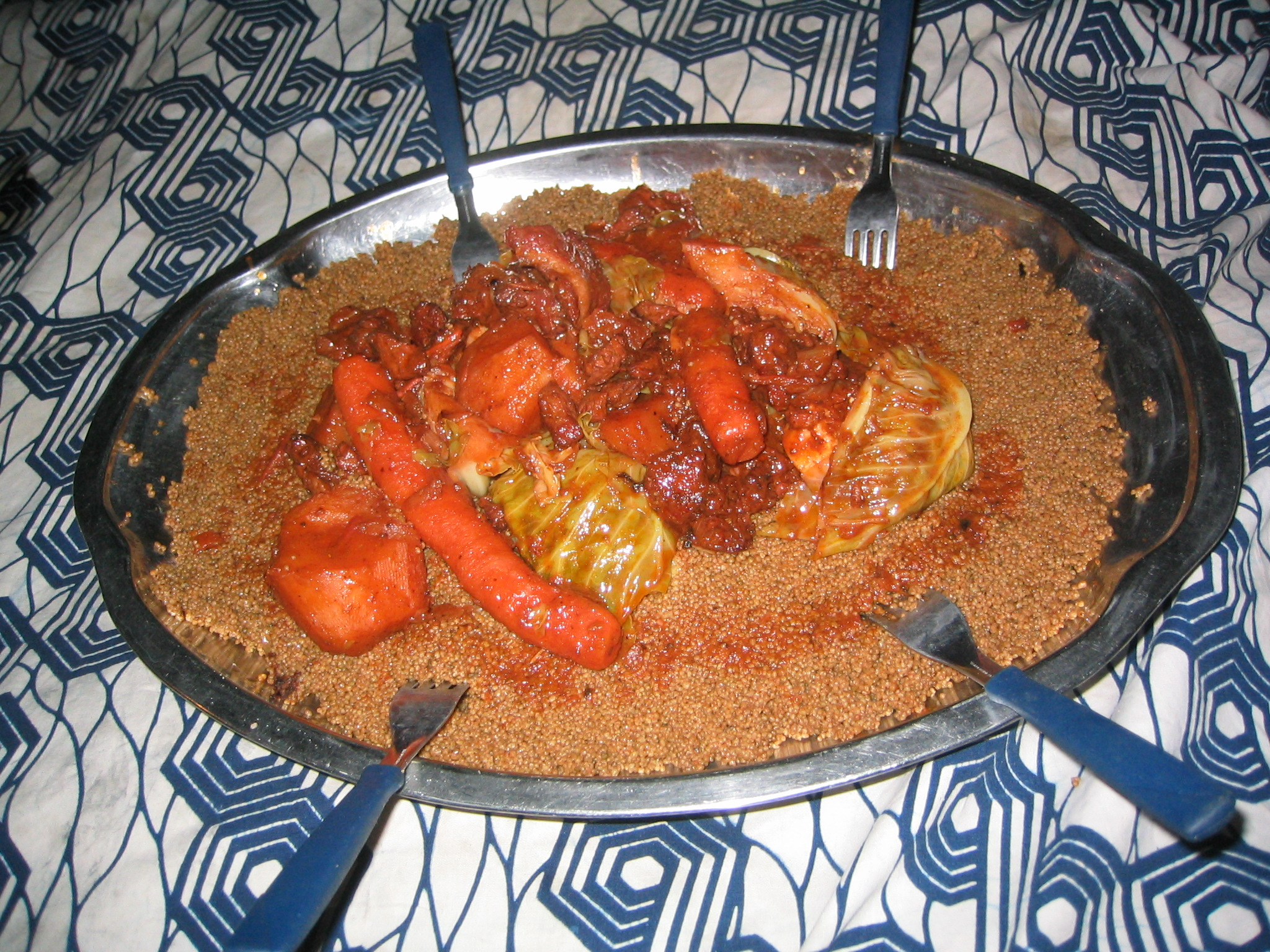 Couscous de dromadaire, réalisé sous la tente dans les dunes d'Ajouer (Mauritanie)